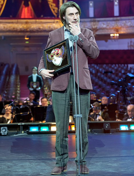 Борис Константинов Фотограф Дмитрий Дубинский